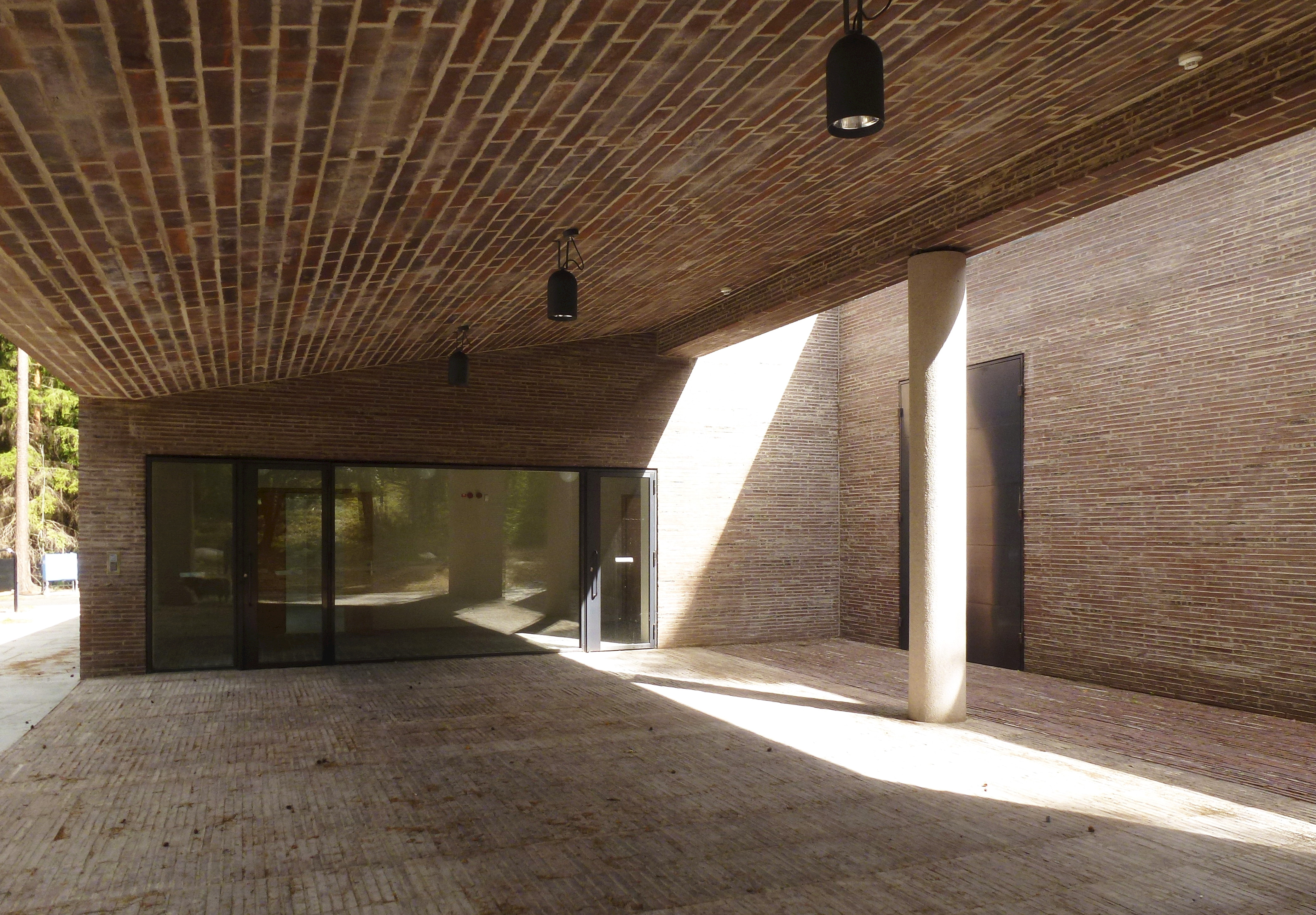 Skogskrematoriet II (Nya skogskrematoriet på Skogskyrkogården)